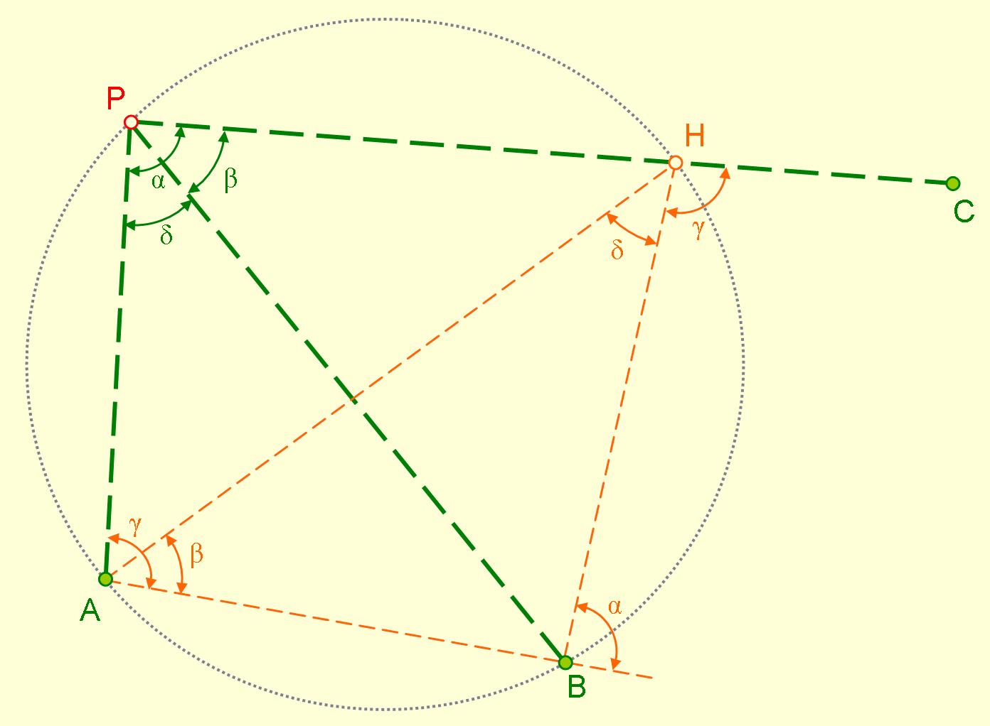 Het principe van de achterwaartse insnijding volgens de rekenmethode van Collins